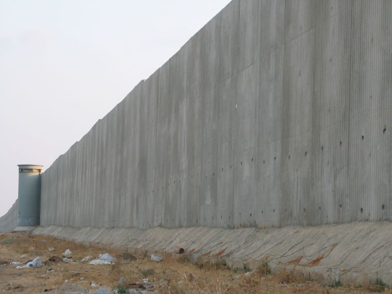 Israeli West Bank barrier